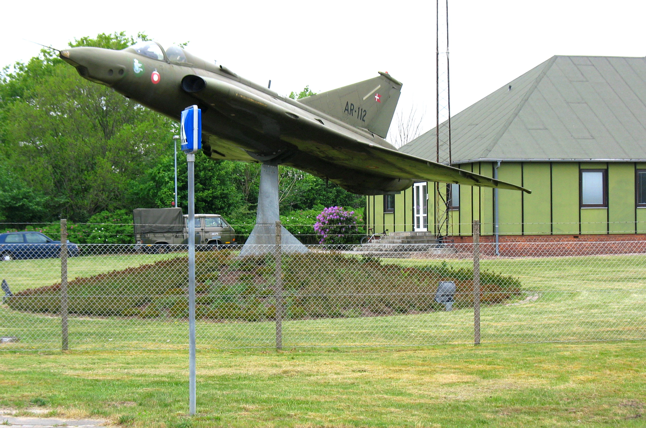 Flugstöðin í Karup.